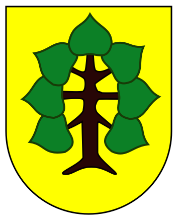 Nachbau des Wappen der Gemeinde Markersdorf (Görlitz)